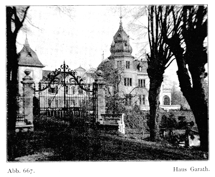 Haus Garath in Düsseldorf vor 1904, umgebaut und erweitert nach einem Entwurf des Regierungsbaumeisters Schleicher.jpg